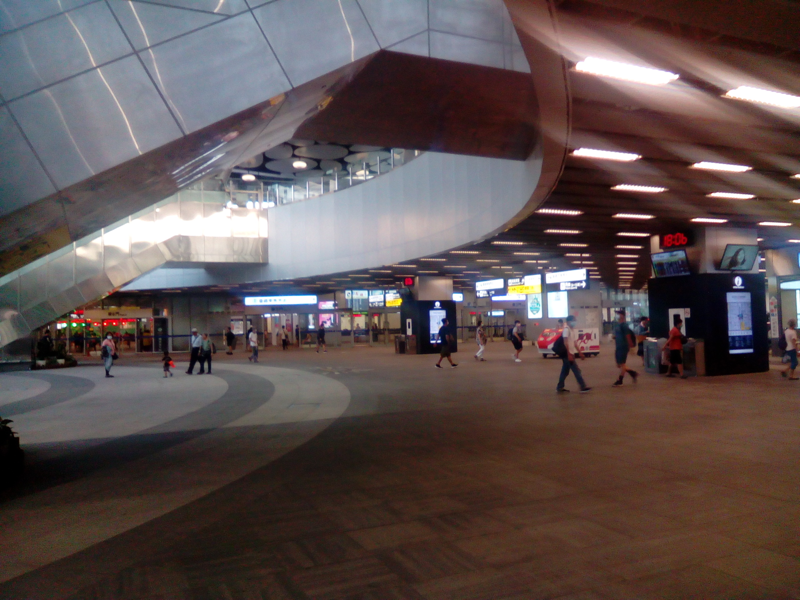 中文（台灣）: 臺灣鐵路管理局高雄車站中庭